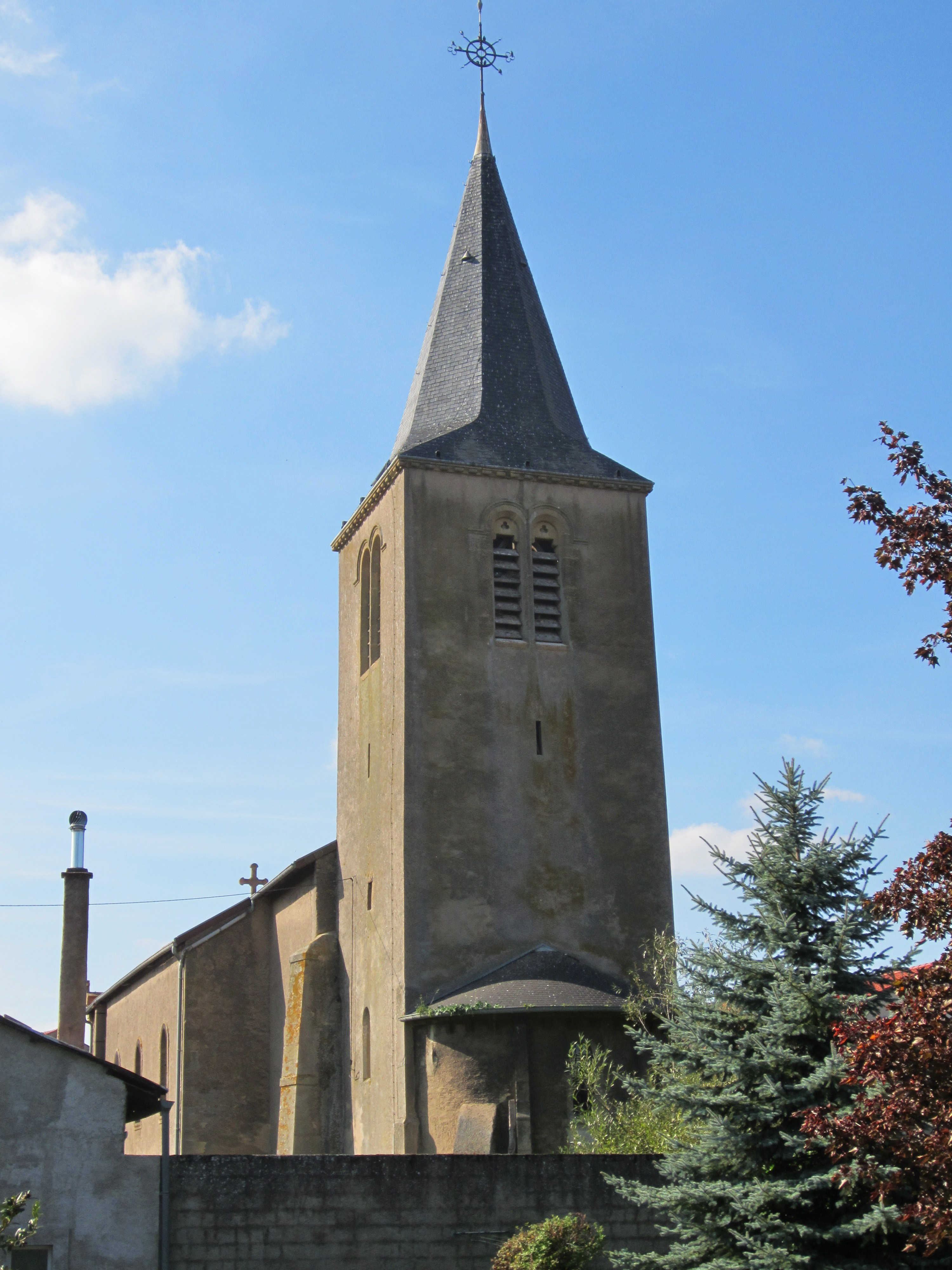 Description eglise de Rezonville Date25 September 2011Sourcemon appareil photoAuthorAimelaimePermission (Reusing this file) eglise de Rezonville